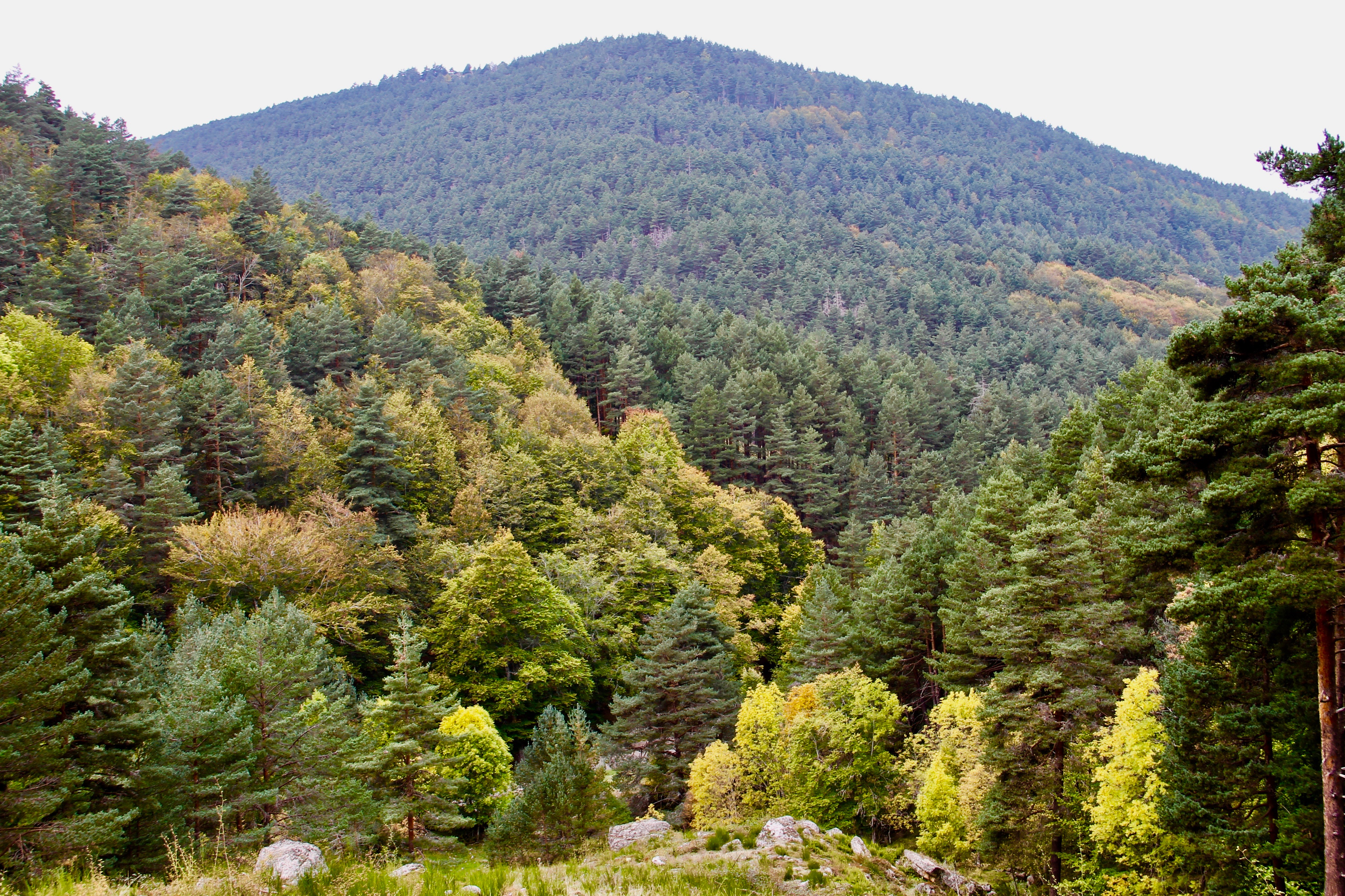 Sierras de Urbión y Cebollera This is a photography of a Special Area of Conservation in Spain with the ID: ES4170116. Natura2000 entry, EEA entry